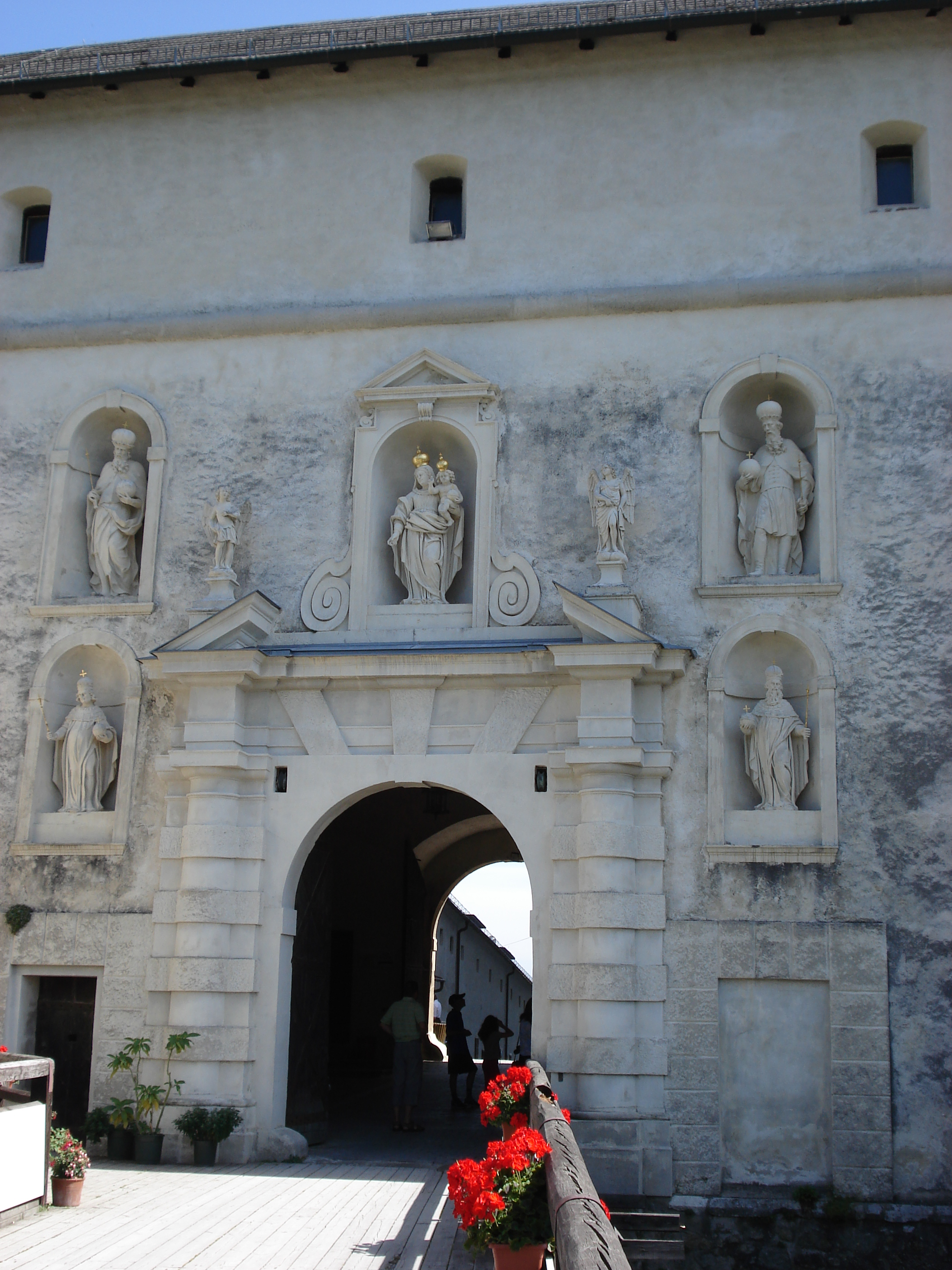 Forchtenstein_1